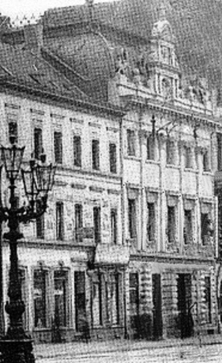 z